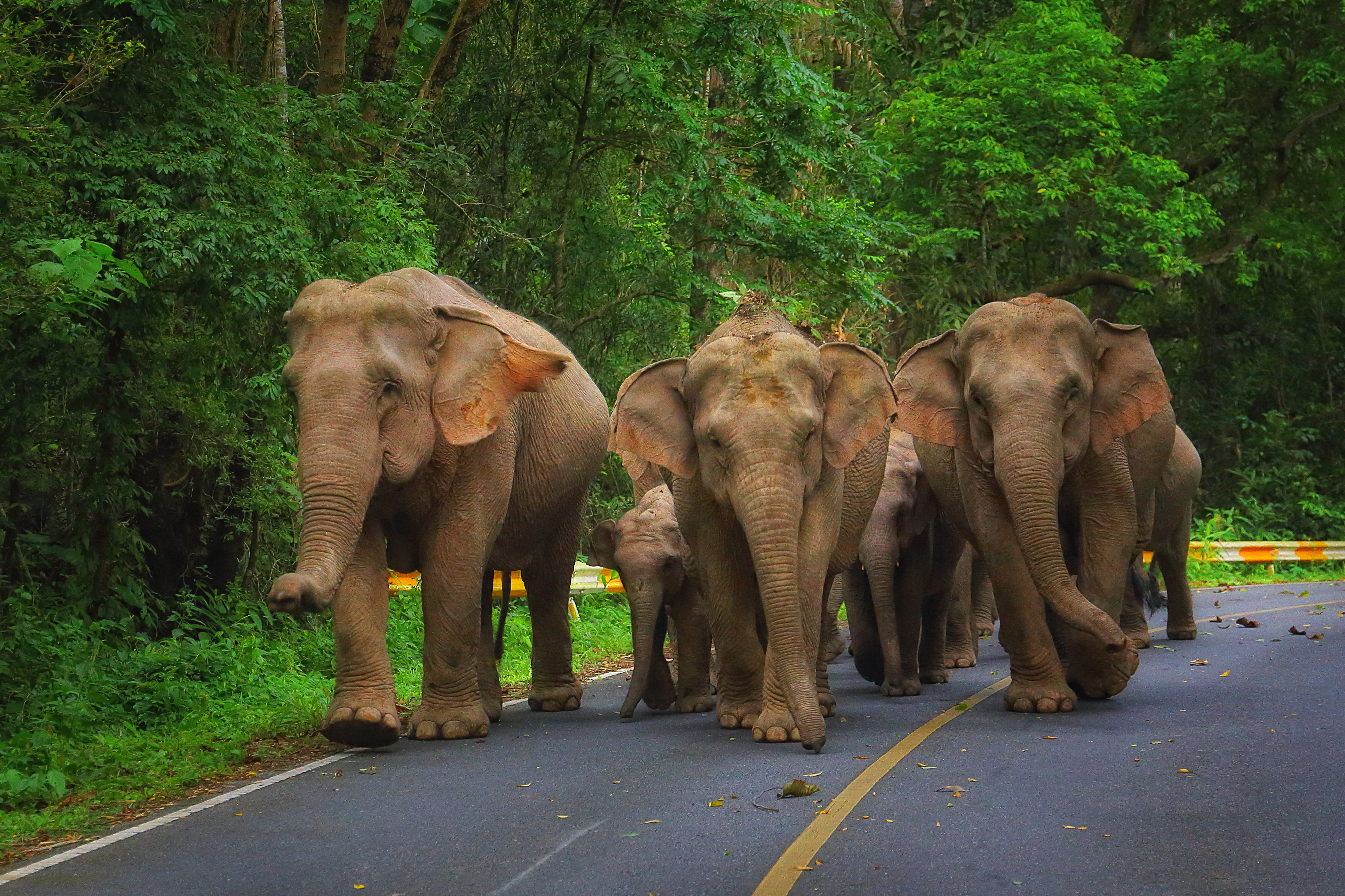 ความสุขของช้างป่าที่ออกมาเดินเล่นใกล้ชิดกับมนุษย์บนอุทยานแห่งชาติเขาใหญ่